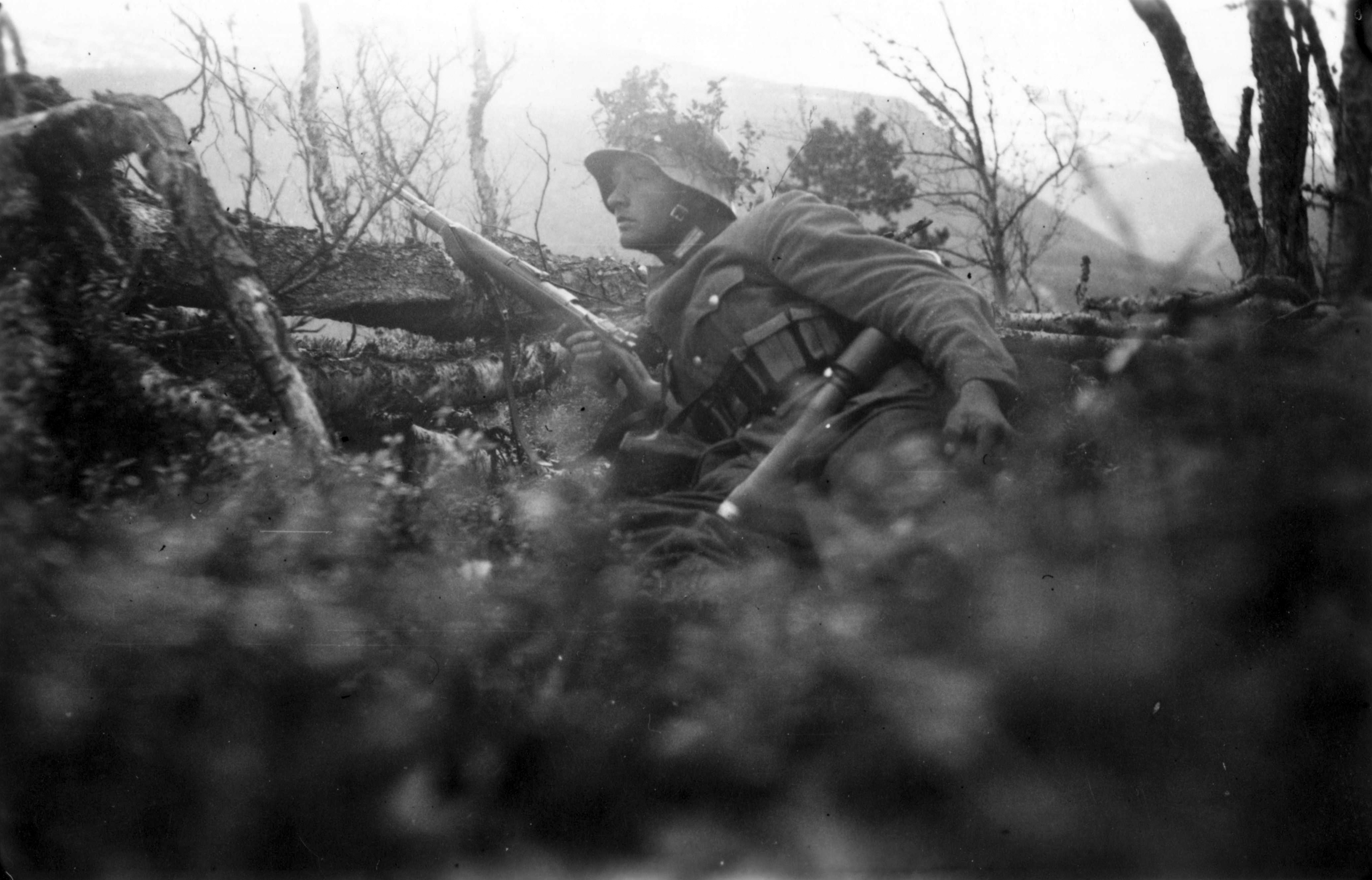 Rudi Margreiter i stilling i Saltdal Tittel / Title: Rudi M i stilling i Saltdalen på østsiden av elva ved Pothus. Dato / Date: 25. mai 1940 Fotograf / Photographer: Rudi Margreiter Sted / Place: Saltdalen, Nordland, Norge Eier / Owner Institution: Arkiv i Nordland Lenke / Link: Arkiv i Nordland Arkivreferanse /Archive reference: AIN.NA143.0075 Fra Dag Skogheims Privatarkiv Tekst bak på bildet: In der bergstellung vor Rognan (Der absender)